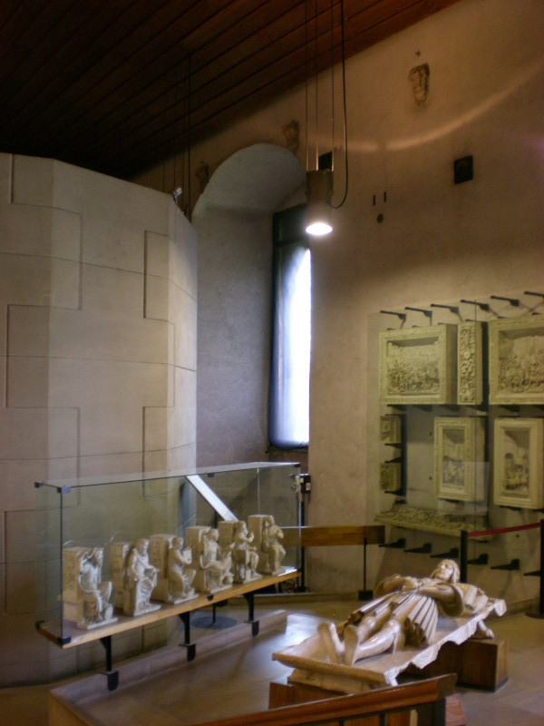 Scorcio sala 15 o sala degli Scarlioni